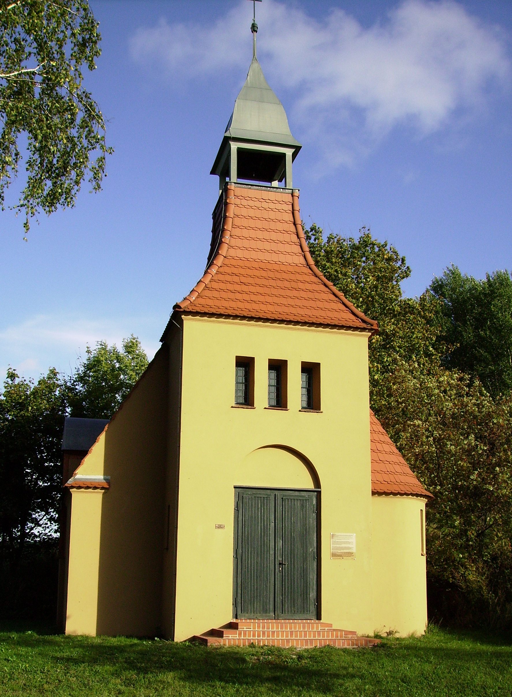 Evangelische Kapelle Wilhelmshof zwischen Plöwen und Ramin, bei Löcknitz.